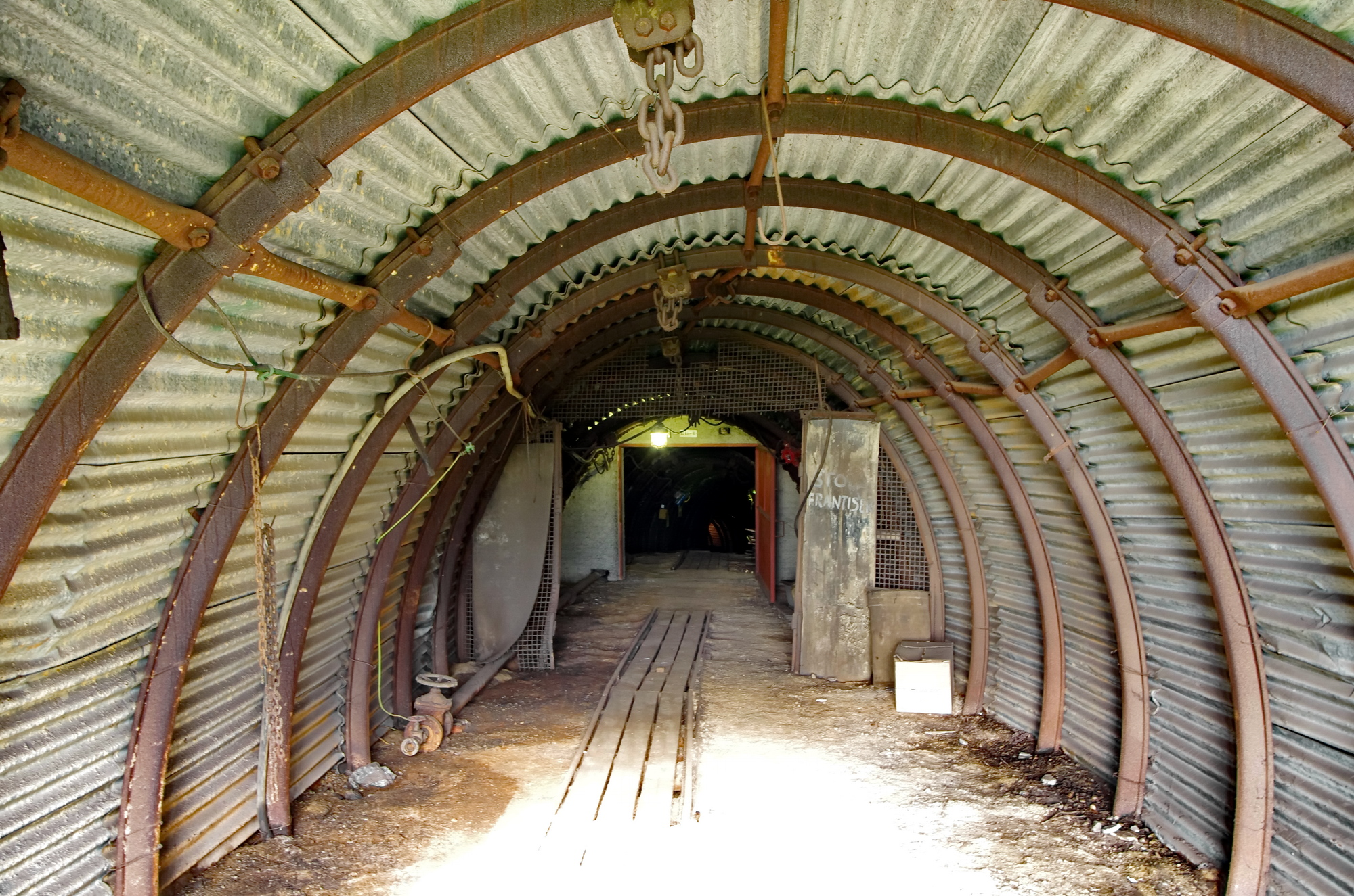 Štola František hlubinného dolu Marie II., Sokolov